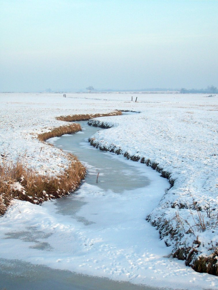 dankzij het niet doorgaan van de ruilverkaveling in de jaren '60